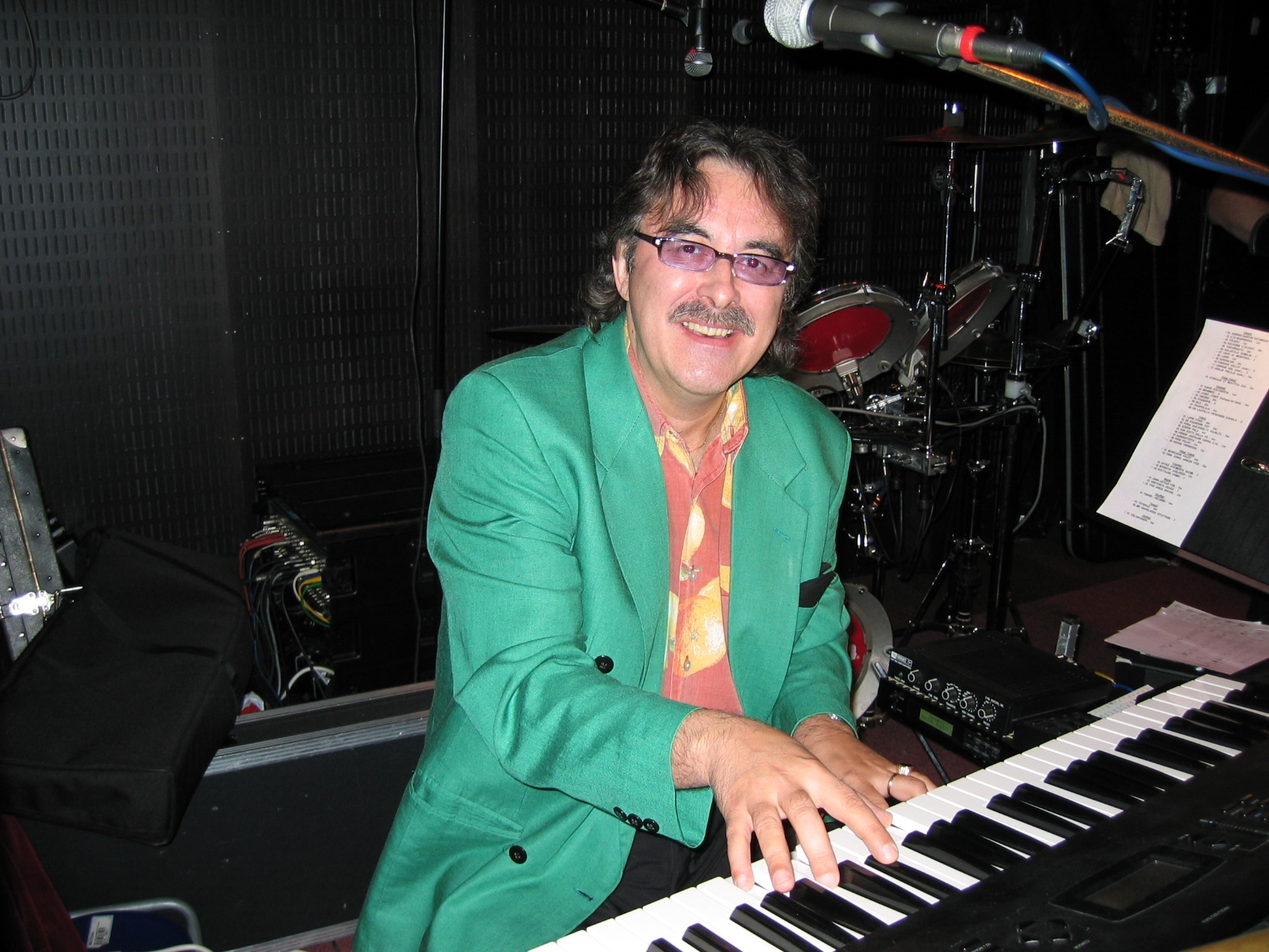 Sławomir Telka